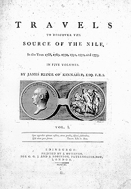 Titelpagina van het boek "Travels to Discover the Source of the Nile" door James Bruce, 1790. Publiek domein wegens leeftijd.